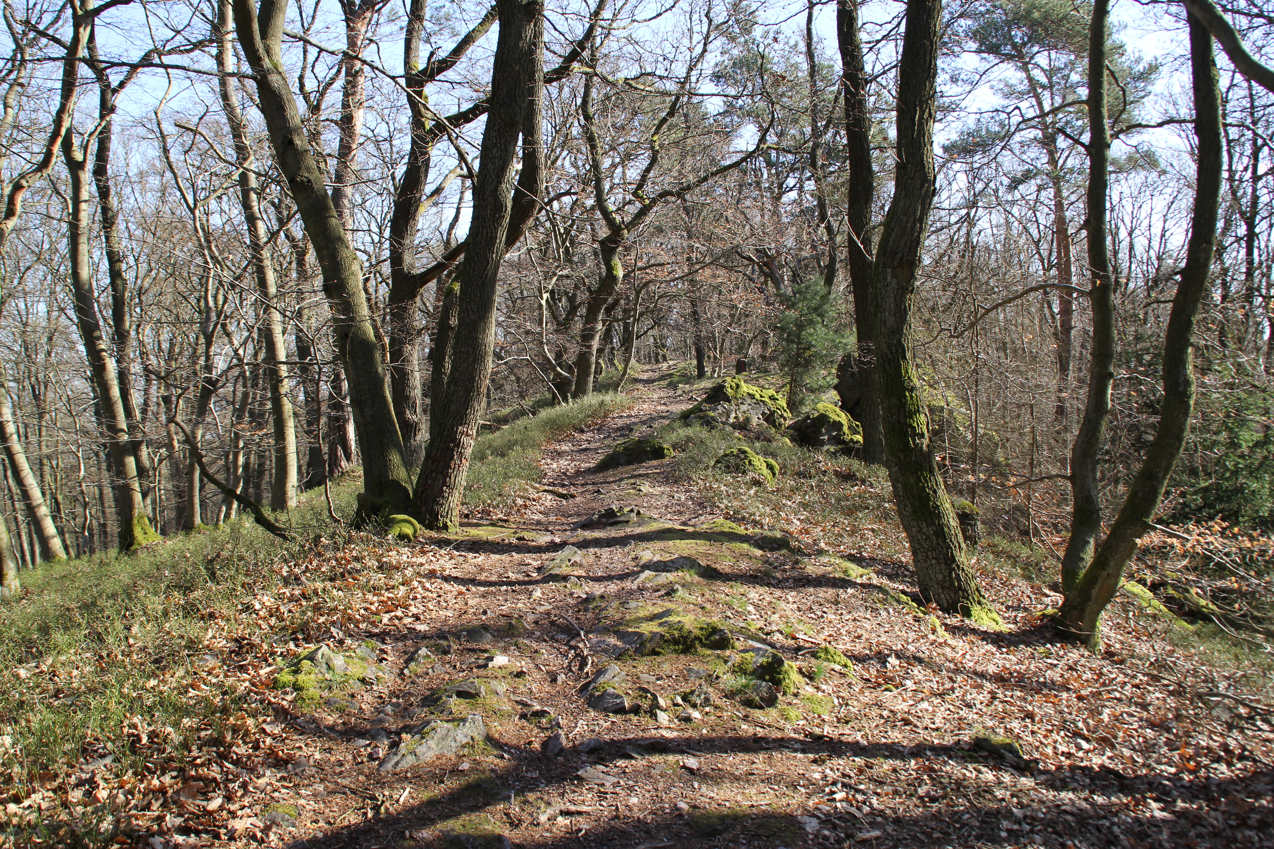 Der Gipfelweg am Hahnenkamm im Spessart, bei Alzenau, Bayern